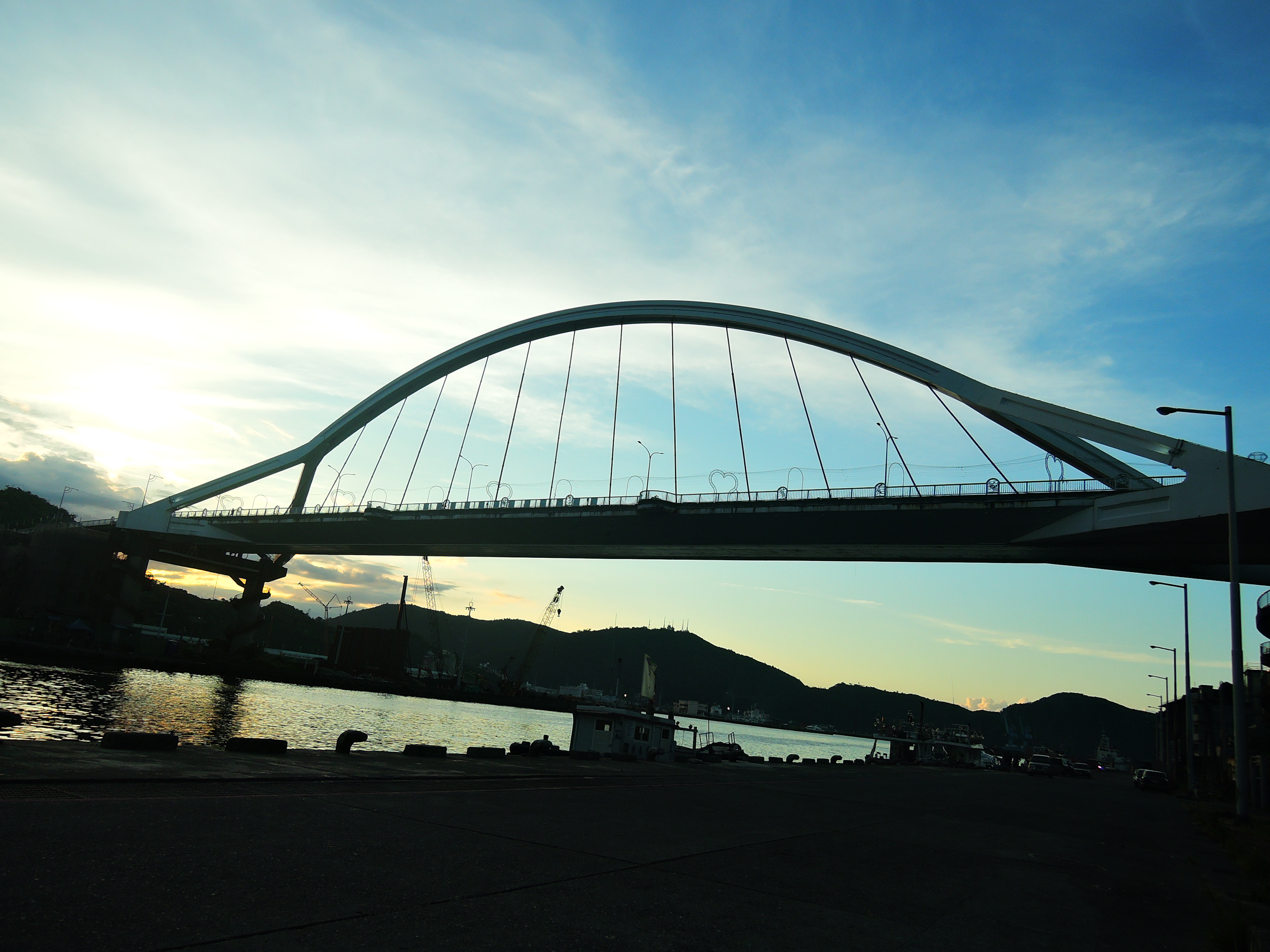 蘇澳鎮南方澳漁港